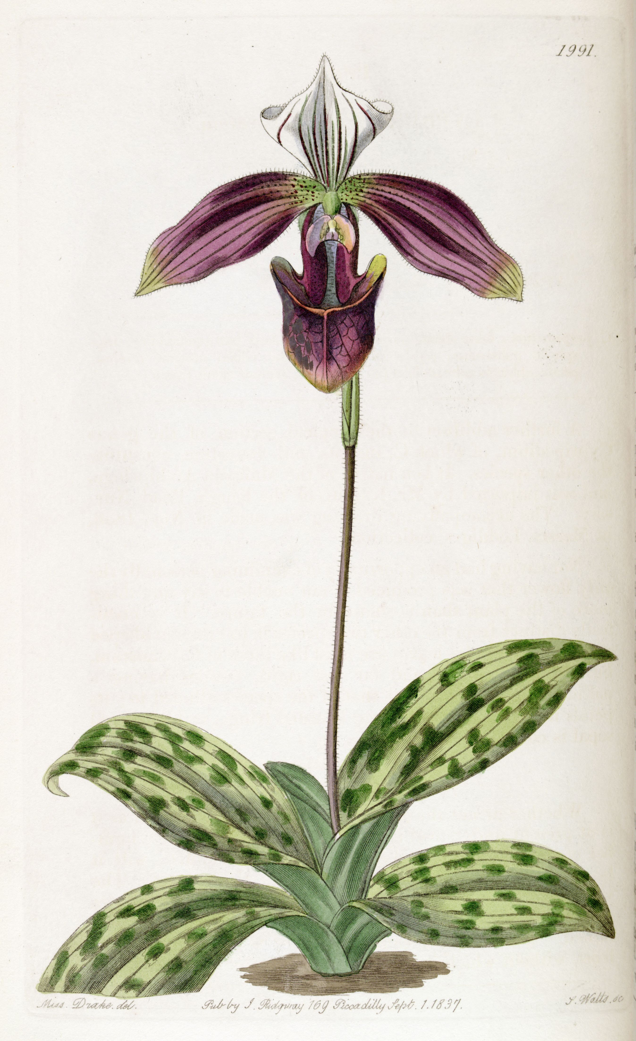 Paphiopedilum purpuratum (as syn. Cypripedium purpuratum)